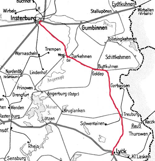 Bahnstrecke Insterburg-Lyck 1938